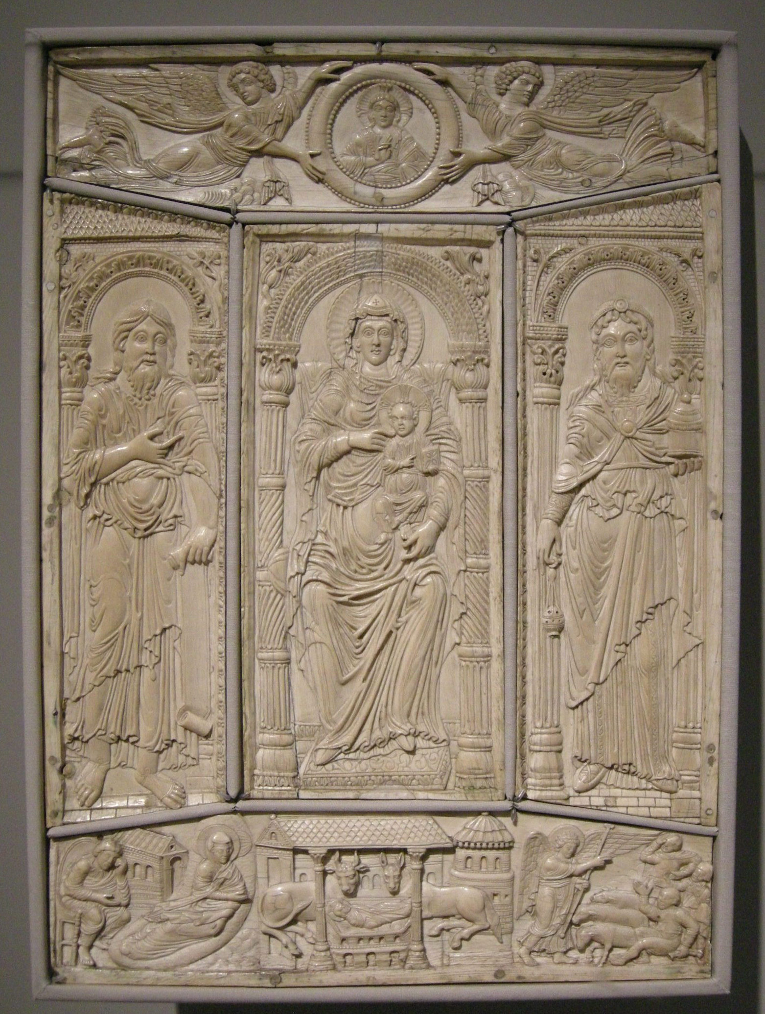 Arte carolingia da Aachen, coperta dell'evangeliario di lorsch, 810 circa